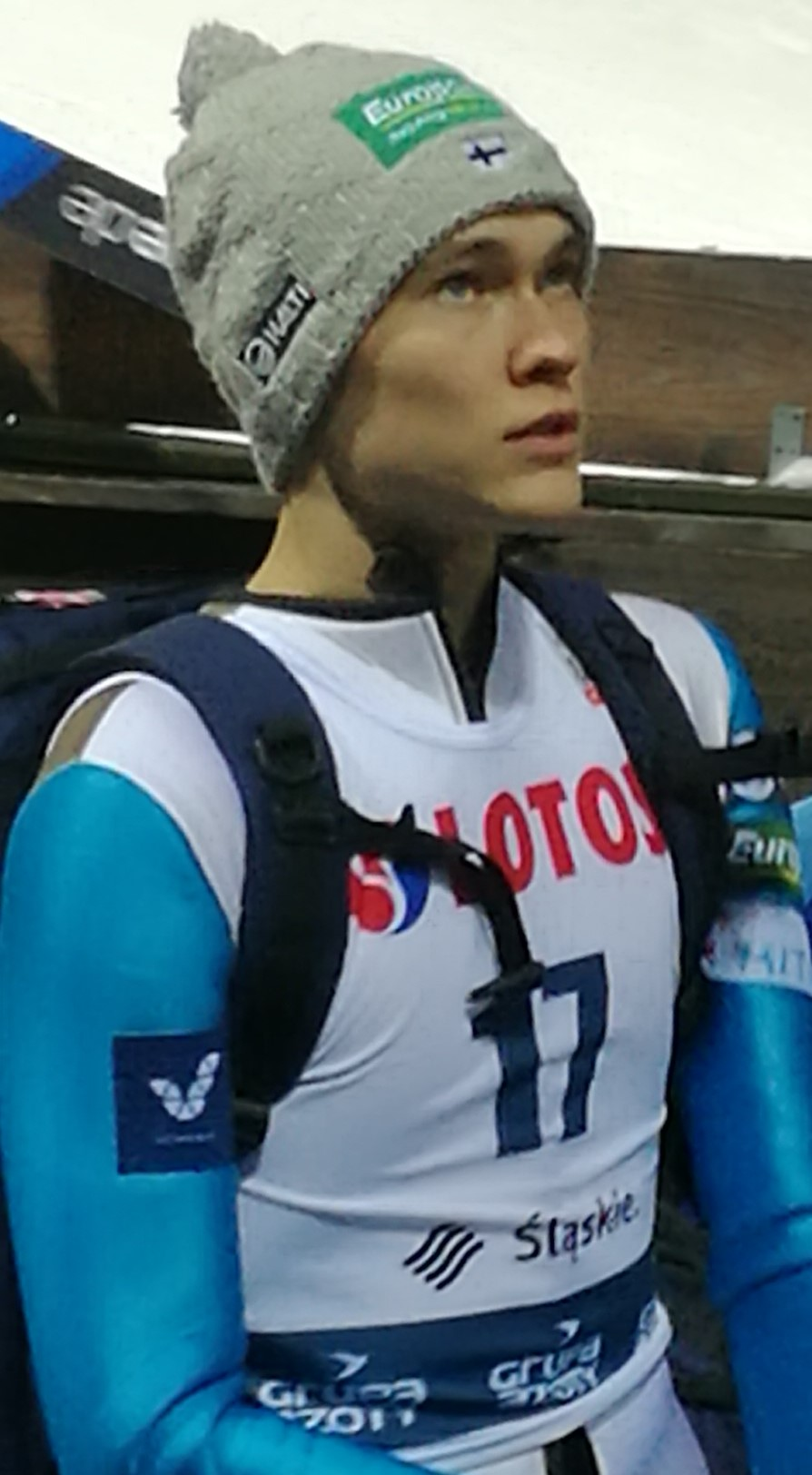 Antti Aalto podczas kwalifikacji do konkursu PŚ w Wiśle (11.2017)